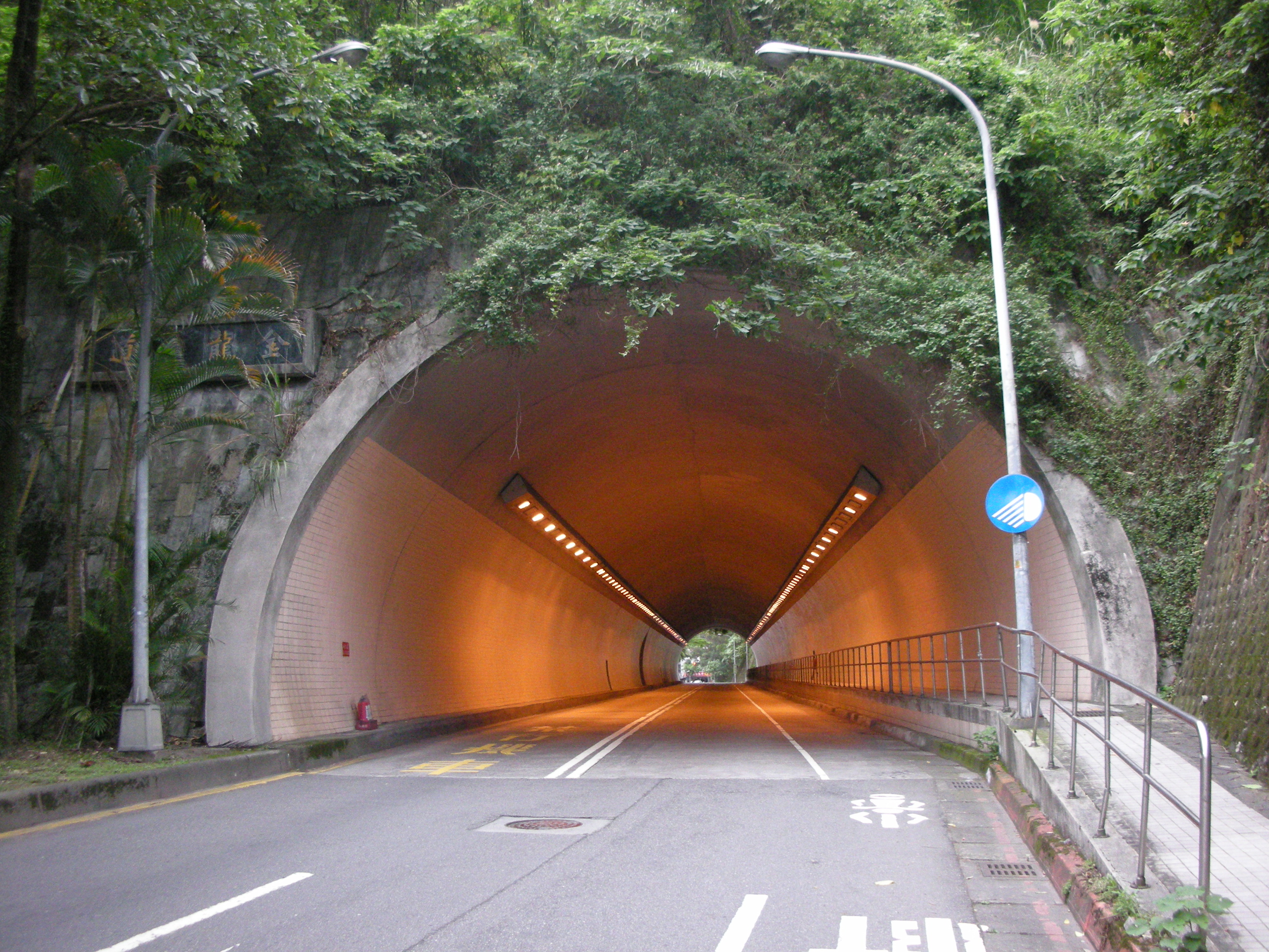 金龍隧道西南端入口